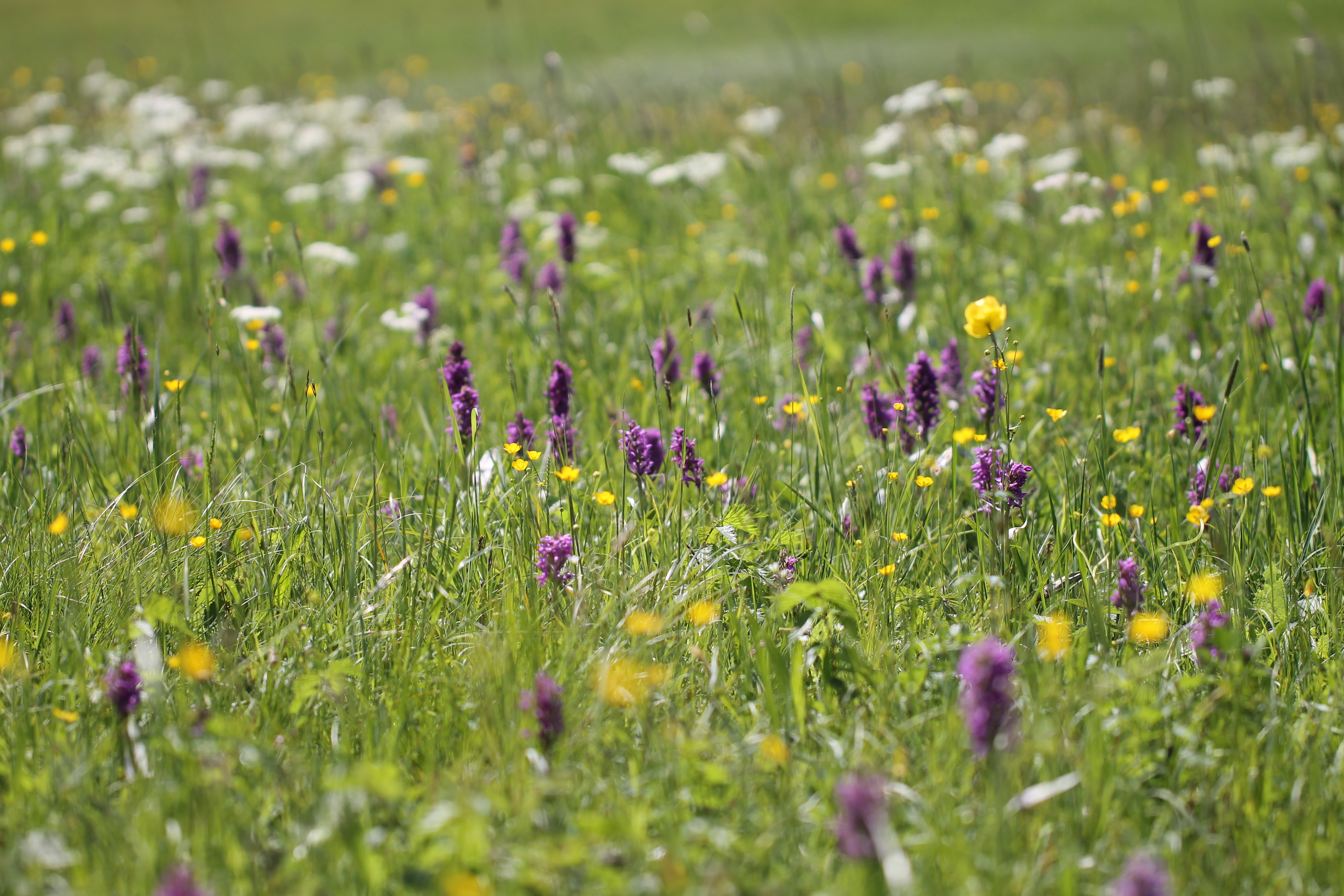 Blüte des Breitblättrigen Knabenkrauts im Naturschutzgebiet Wallersee-Wenger Moor This media shows the nature reserve in Salzburg with the ID NSG00014.